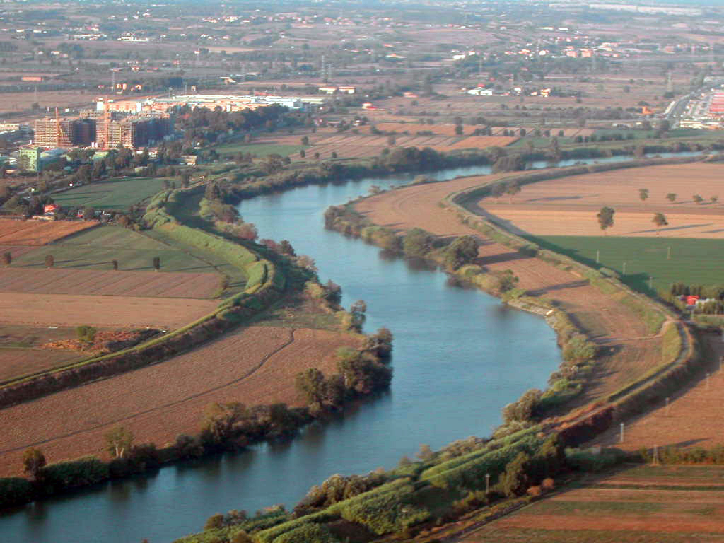 Roma, Meandri del Tevere verso Fiumicino